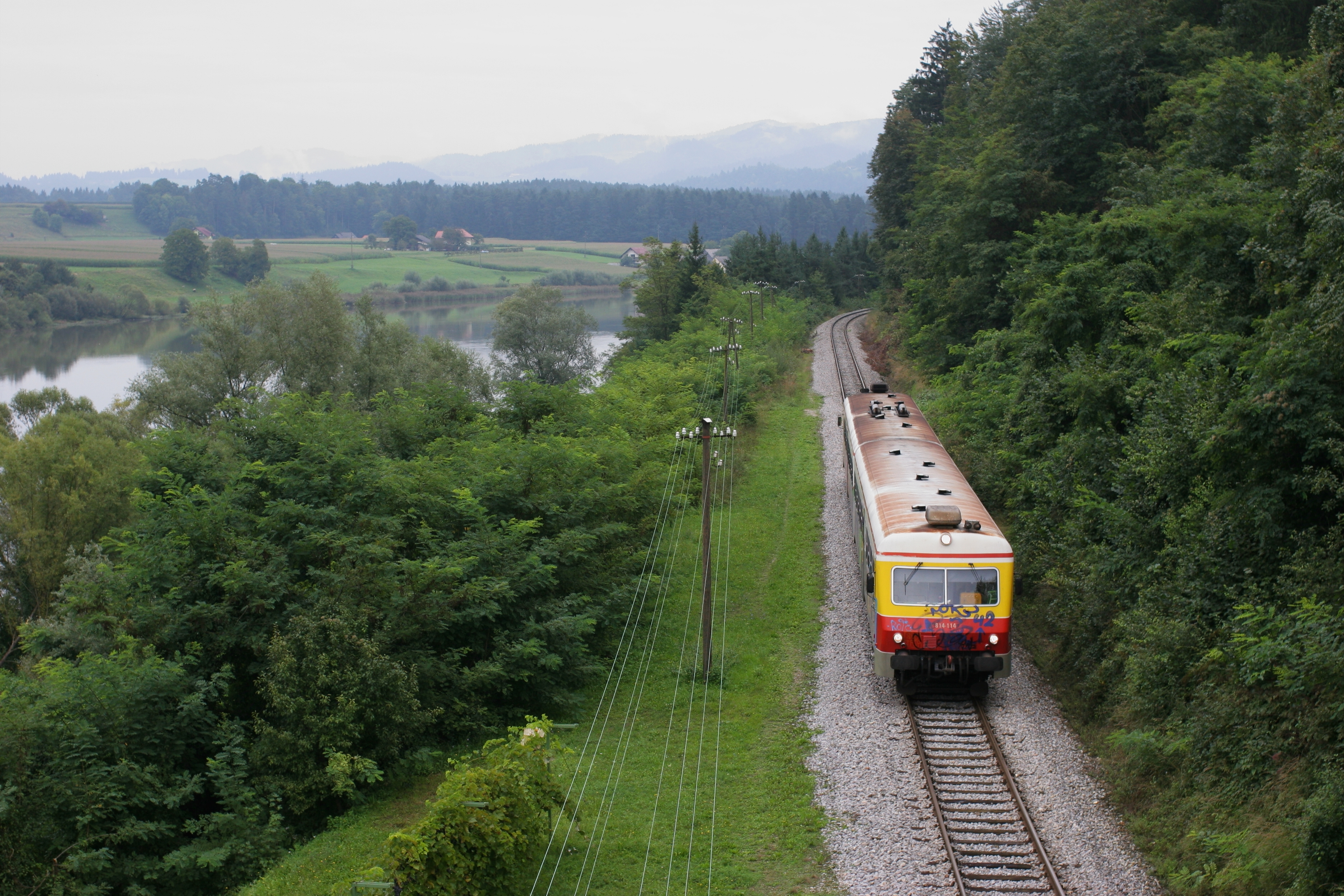 SLO - SZ - 2.3. 814-114 - 2007-08-31 - 15H59 - Trbonje